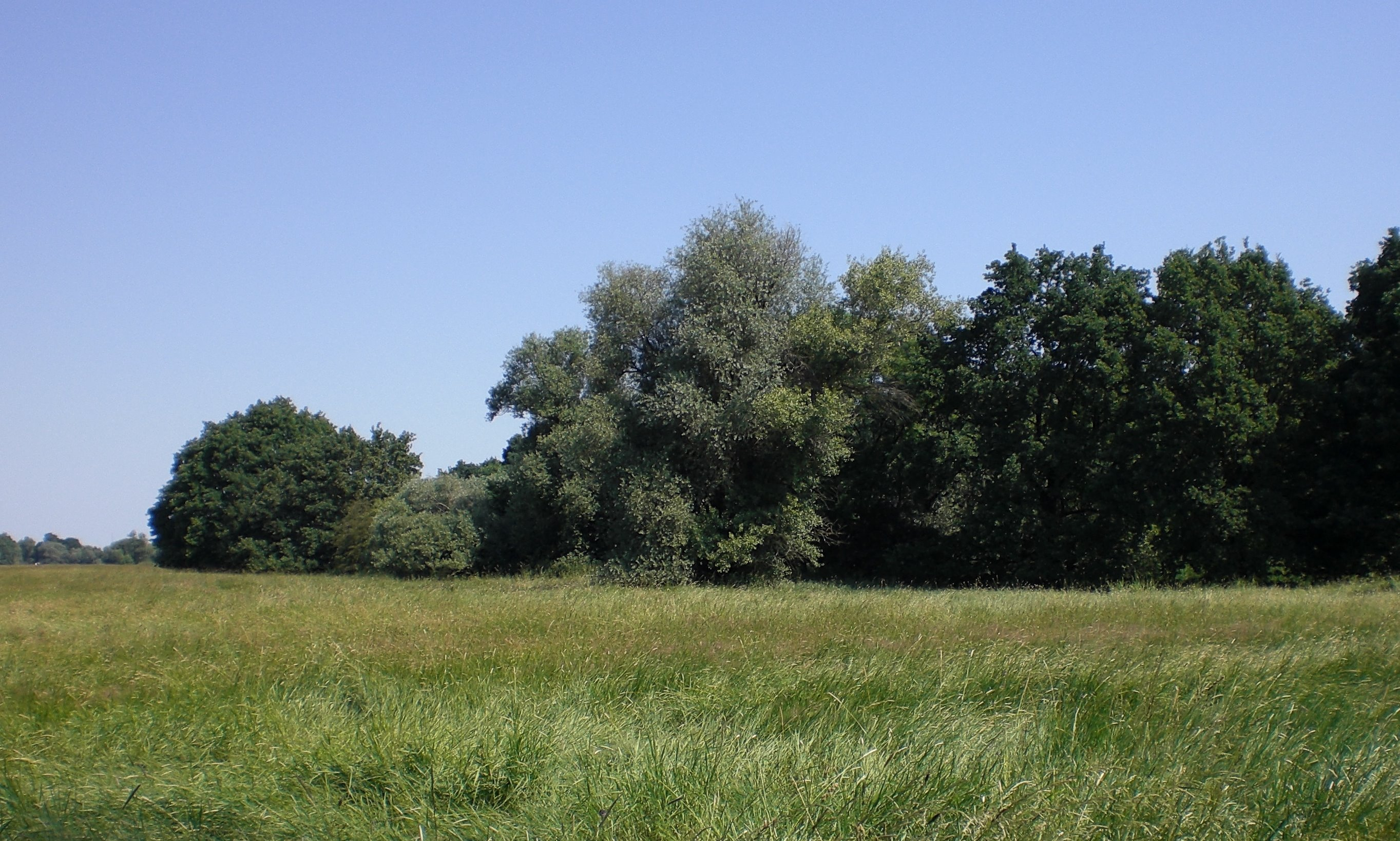 Westlicher Waldrand der Kreuzhorst; Bereich im LSG „Mittlere Elbe“